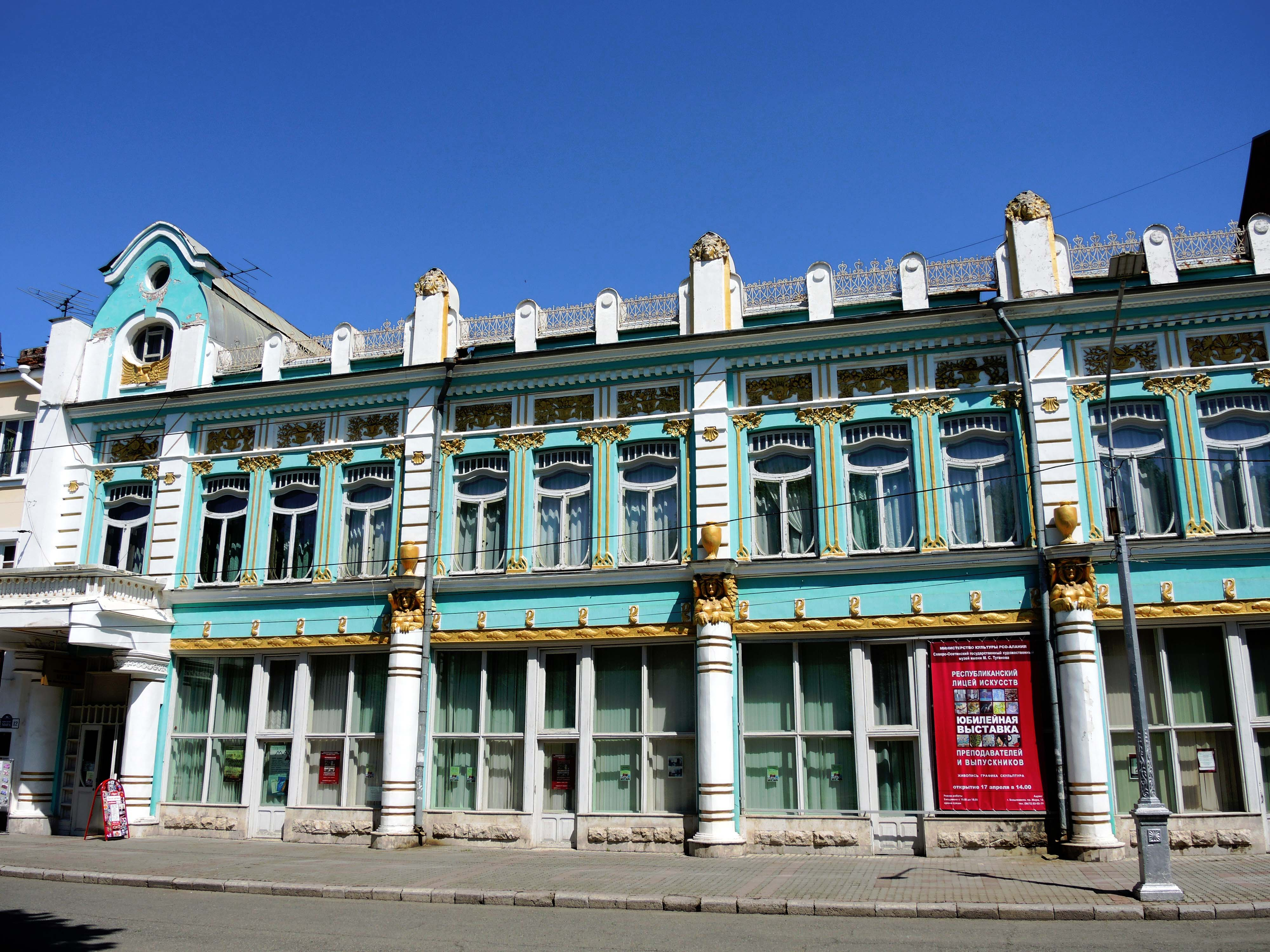 Торговый дом: проспект Мира, 12, Владикавказ, Северная Осетия